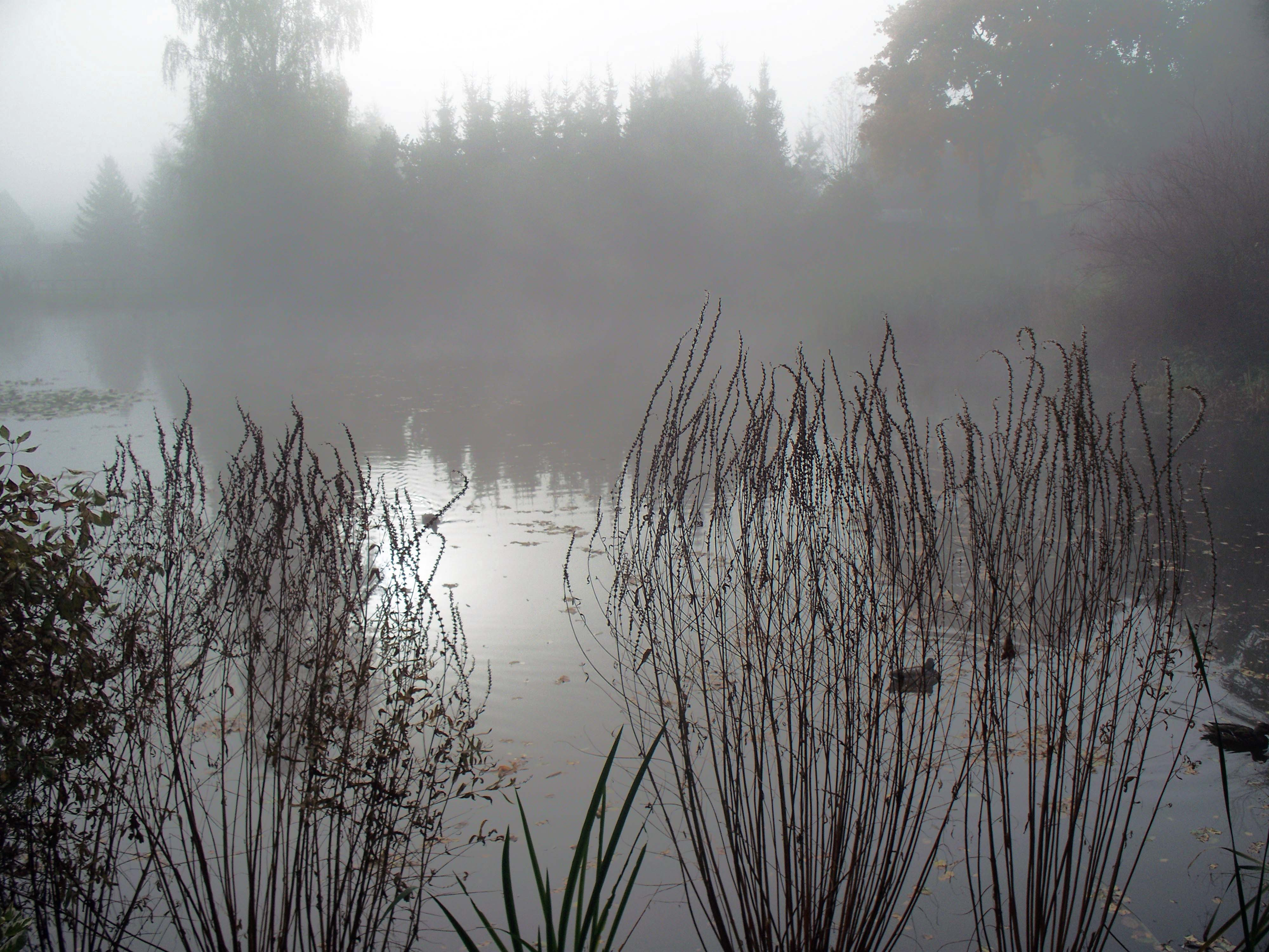 Kurpark Bad Klosterlausnitz